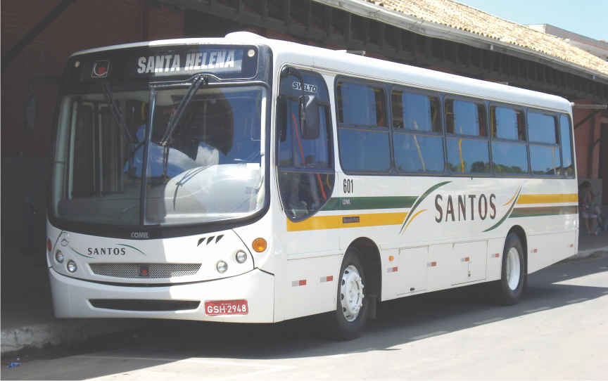 Ônibus urbano da empresa Viação Santos, número de ordem 601, na linha urbana Bicas / Santa Helena